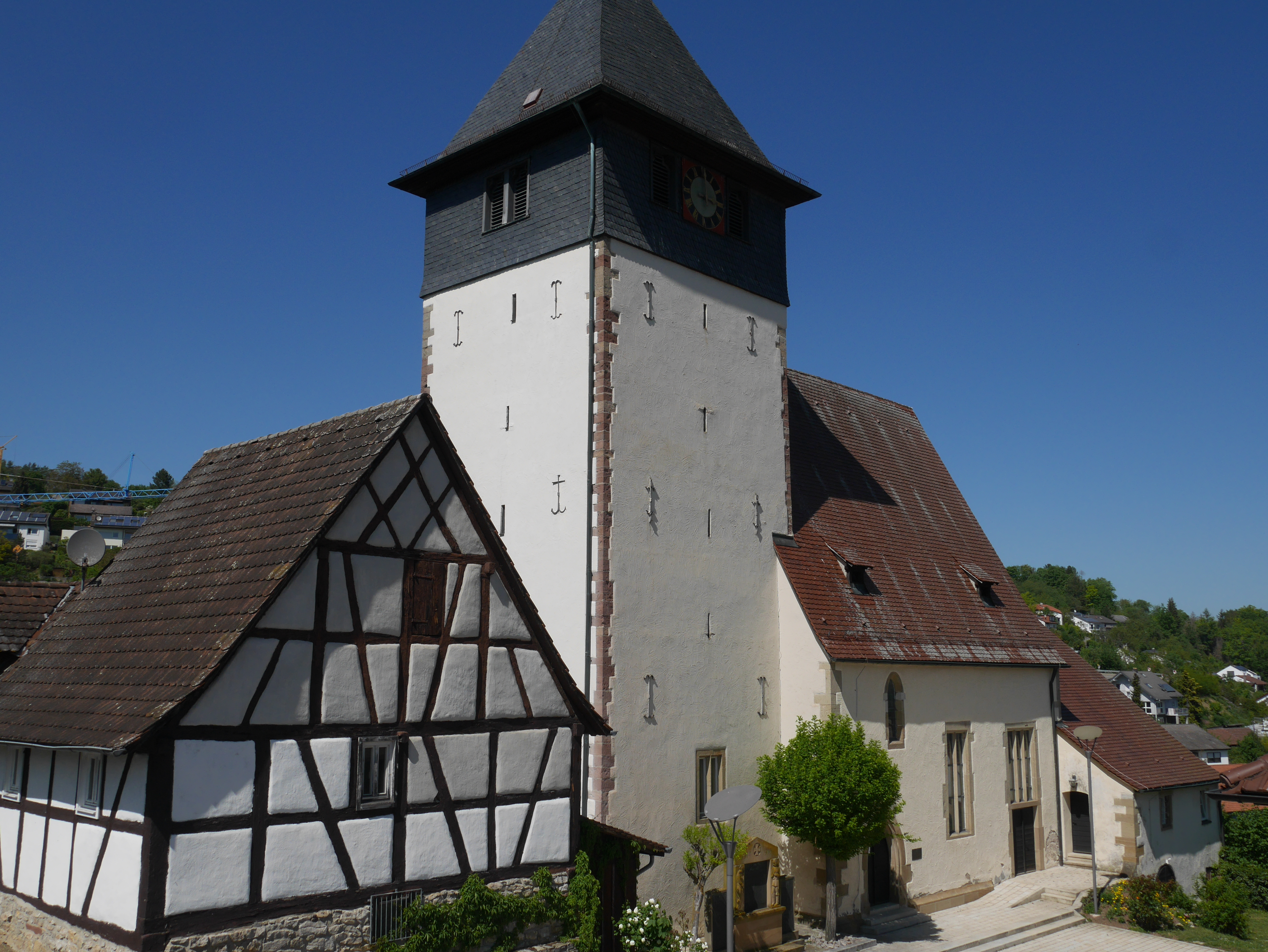 Protestant Church (Iptingen) Süd